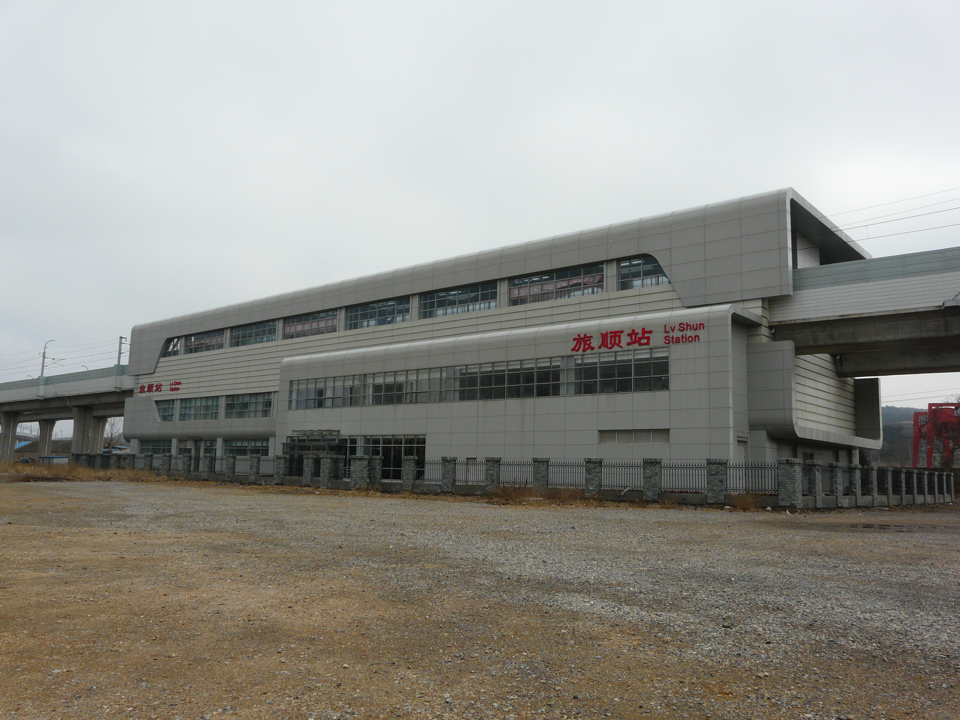 大连快轨8号线的一个车站